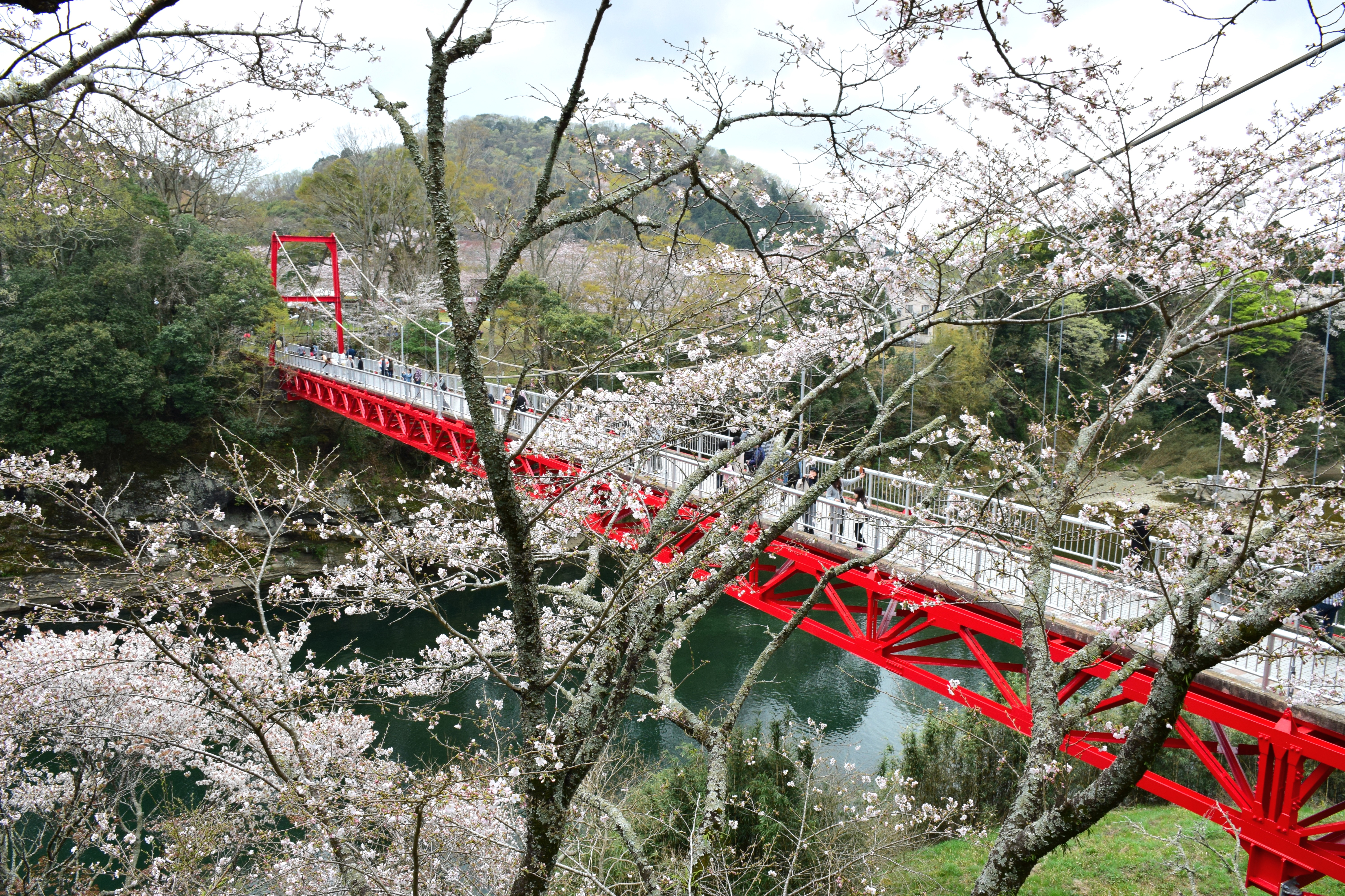 桜淵公園(笠岩橋)